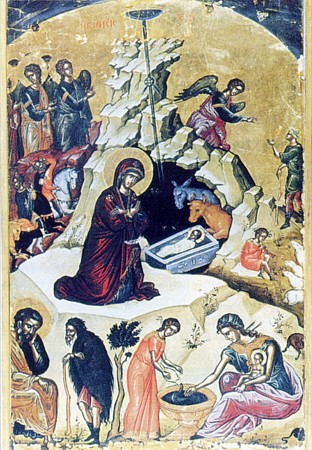 Рождество Христово (икона в Храме)